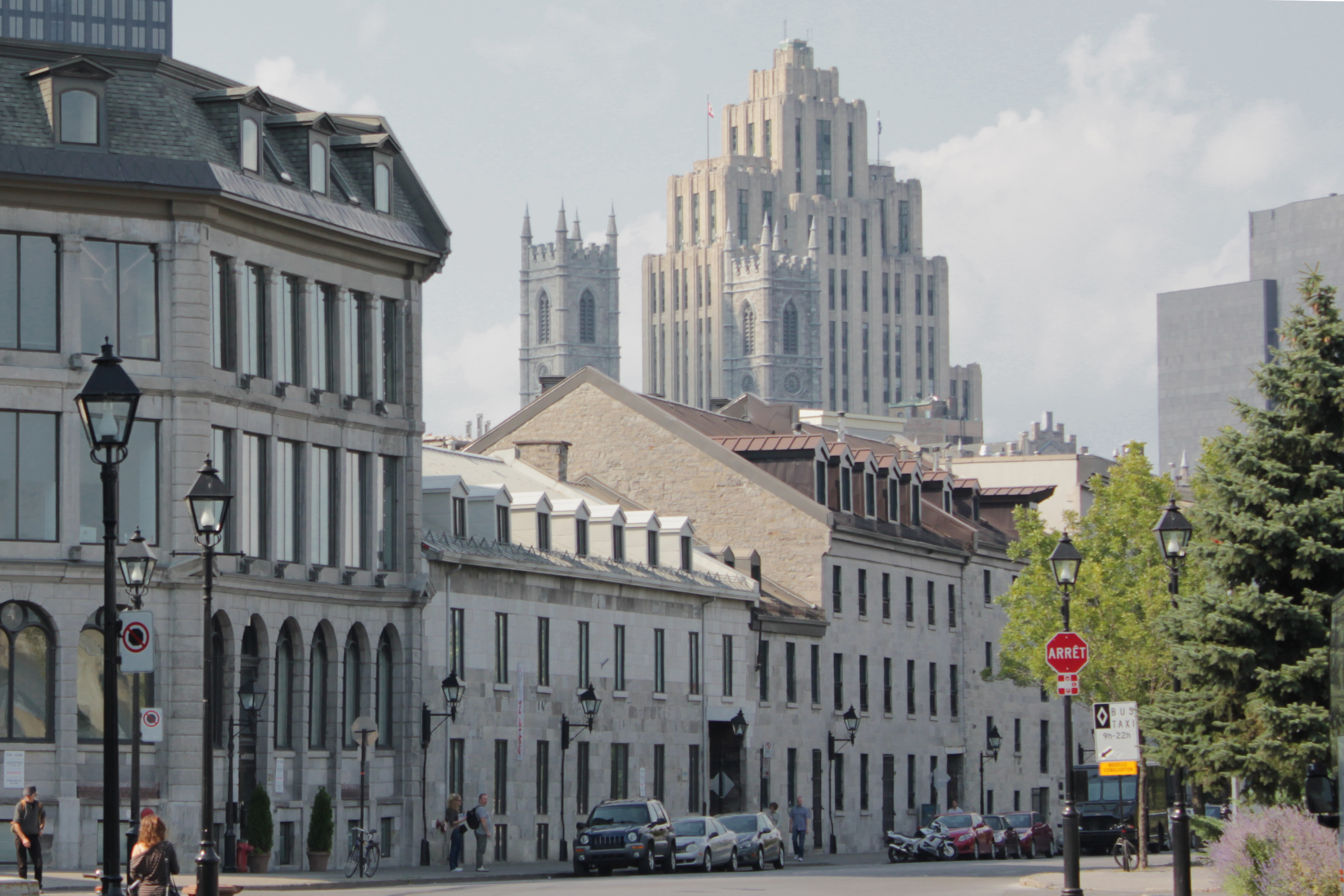 Rue de la Commune dans le Vieux-Montréal. À l'arrière plan : Les deux tours de la basilique Notre-Dame et l'édifice Aldred. À gauche : Magasins des soeurs Grises II